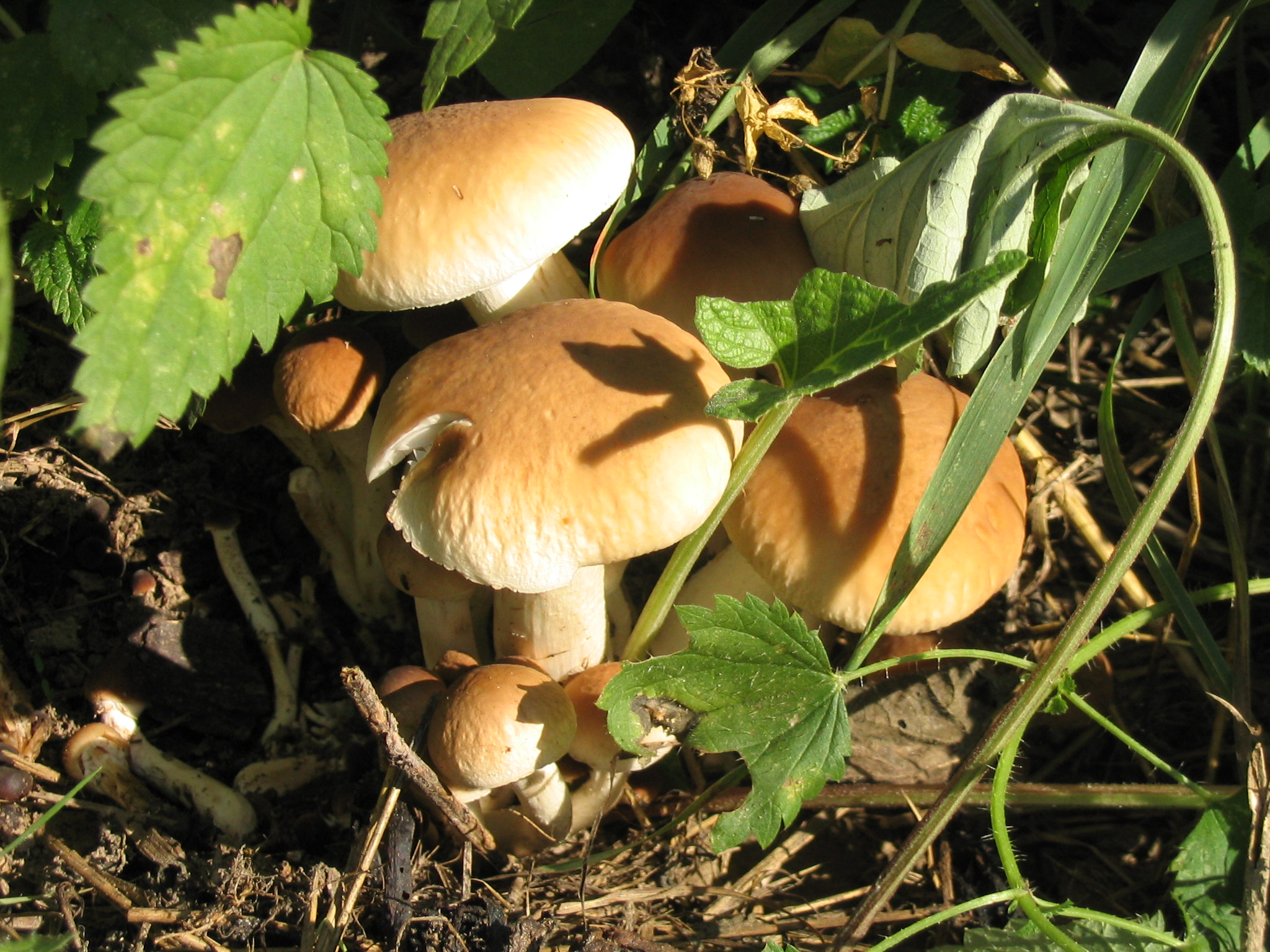 Südlicher Ackerling (Agrocybe aegerita oder A. cylindracea) fotografiert von Dr. Hagen Graebner, am 24.07.2004, Rheinauen bei Ingelheim